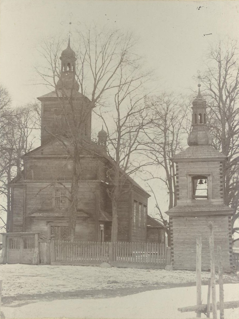 Беларуская (тарашкевіца): Турэц (Turec). Царква